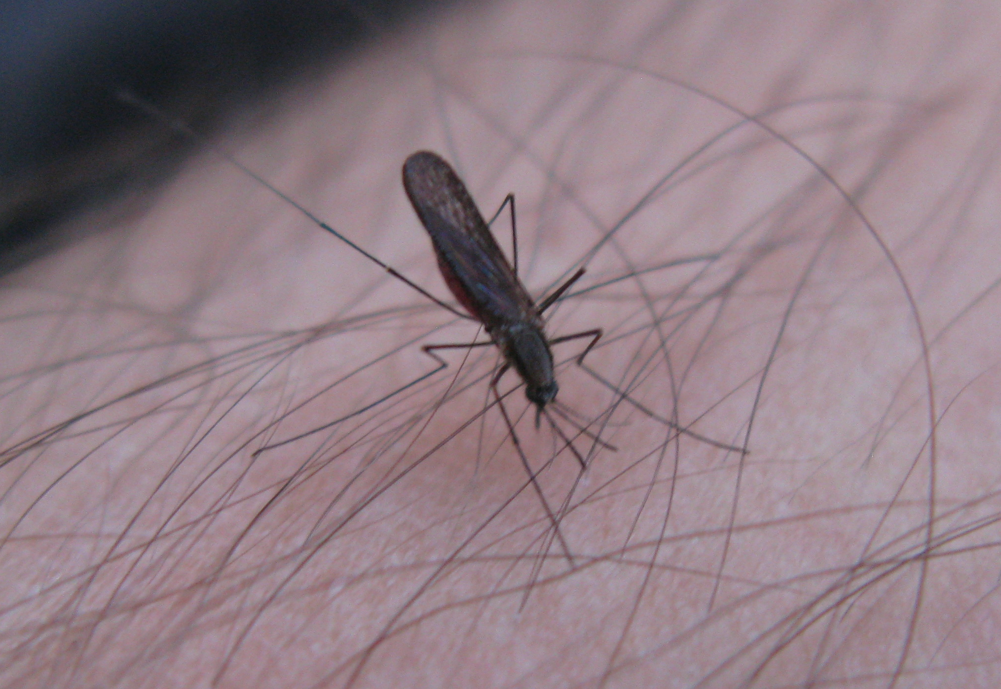 Moustique commun (culex pipiens) sur un bras d'homme, à Ascq.